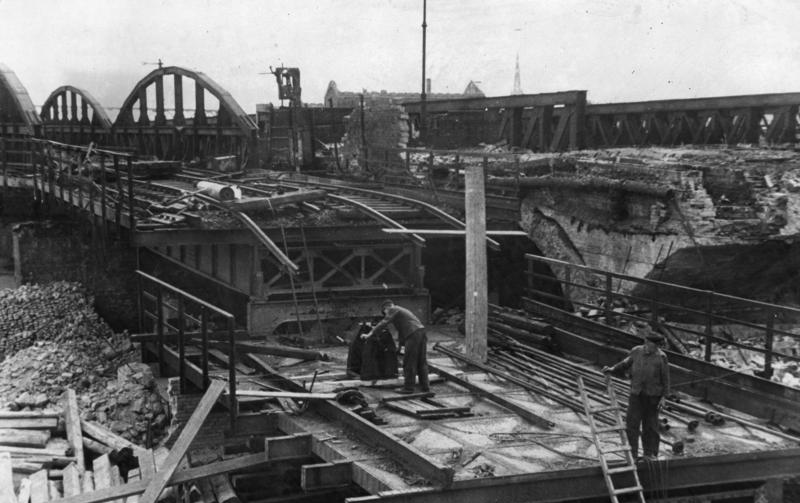 Berlin, Wiederaufbau des U-Bahn-Netzes Illus/Kindermann Berlin, August 1945 Schwere Schäden am U-Bahnnetz Die Berliner U-Bahn verkehrt mit nur ganz wenigen Unterbrechungen fast durchweg wieder. Leider behindern gerade an den wichtigsten Knotenpunkten noch sehr schwere Schäden die Wiederaufnahme des Verkehrs. Dank der fieberhaften Arbeit wird man aber in wenigen Wochen so weit sein, daß Tausende Berliner nicht mehr täglich kilometerlange Wege zurücklegen brauchen. Besonders schwere Schäden müssen am Gleisdreieck behoben werden. Information added by Wikimedia users.